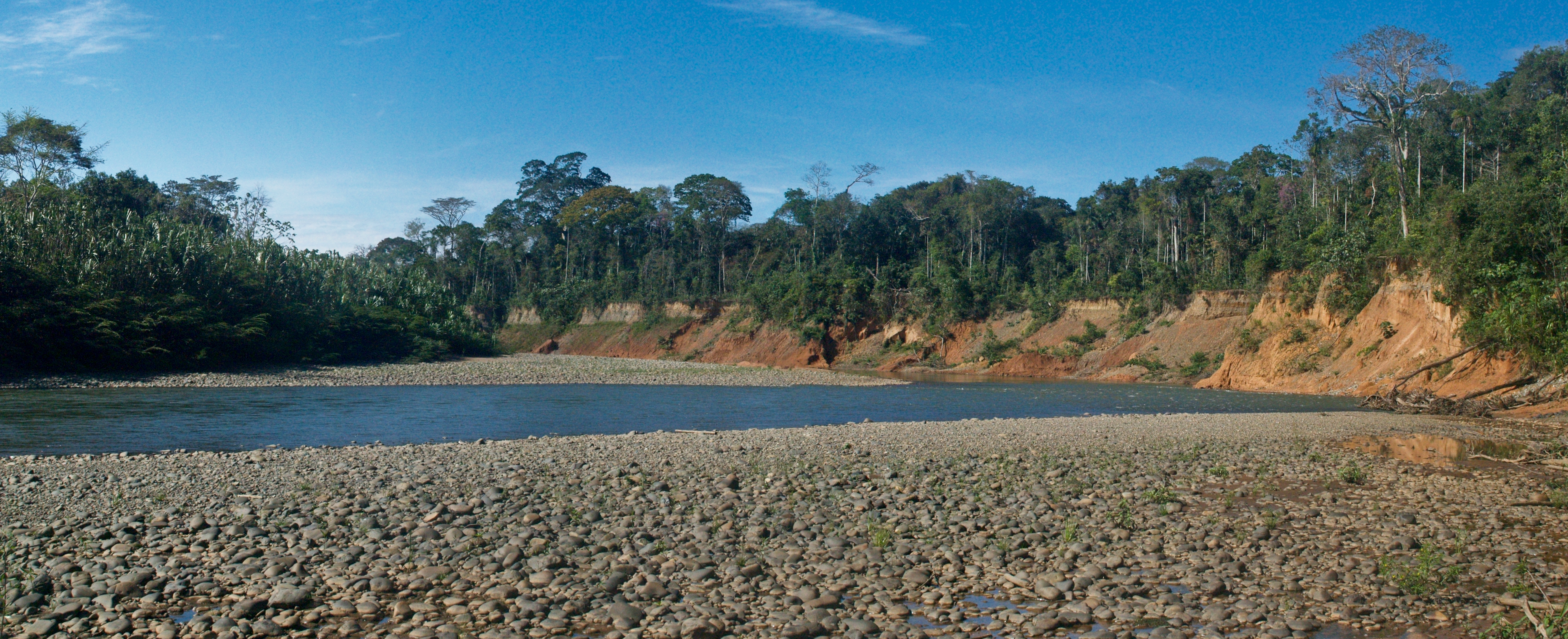 vista de los acantilados en las margenes del río Madidi, en el parque nacional homonimo en el departamento de La Paz, Bolivia.